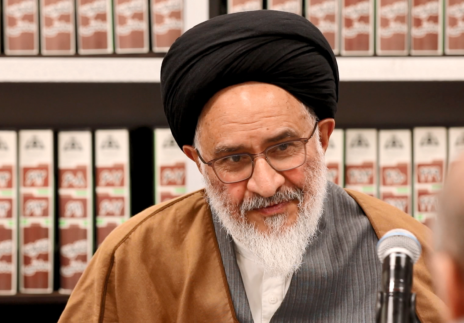 محقق داماد در مرکز پژوهشی دانشنامه های حقوقی علامه